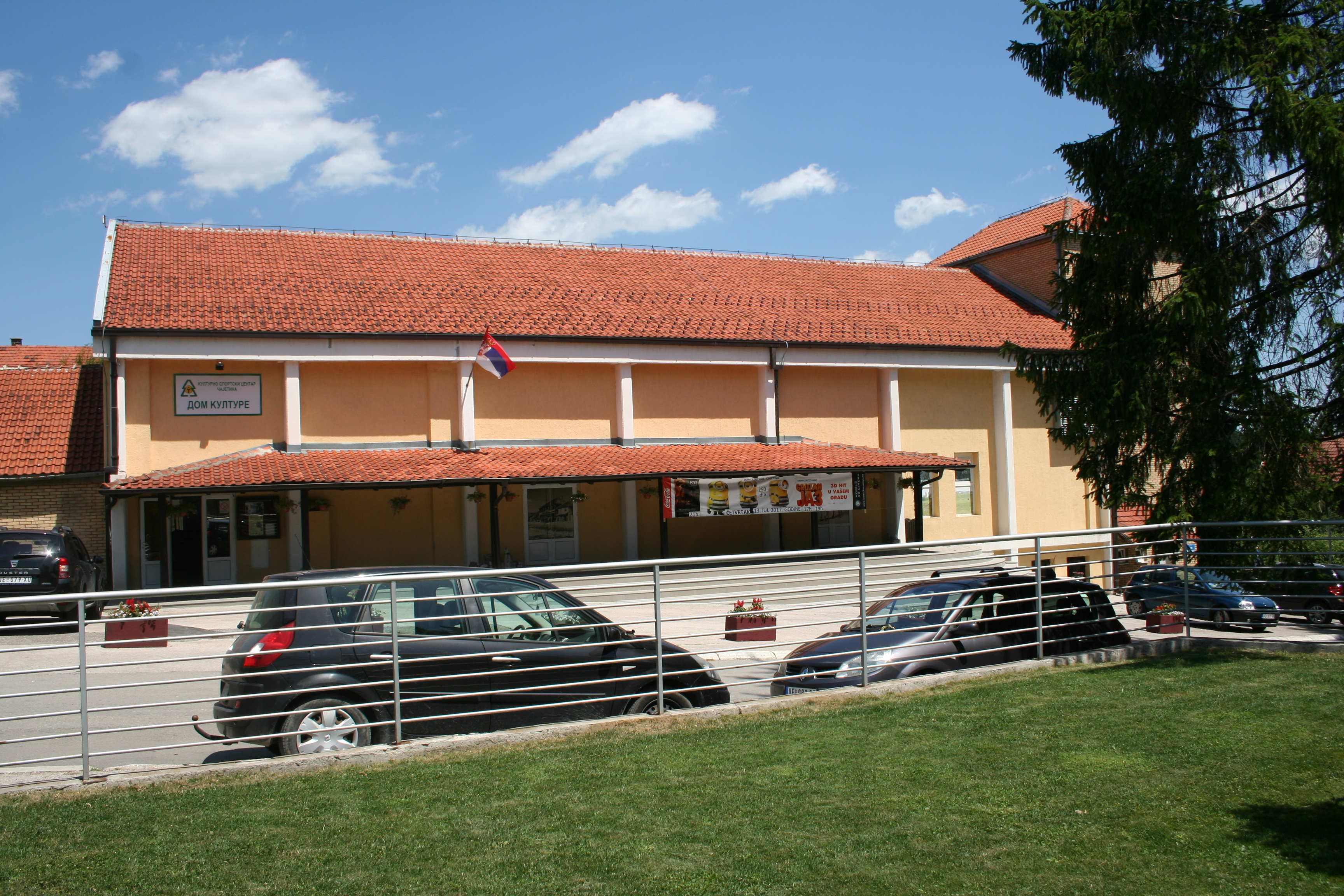 Čajetina